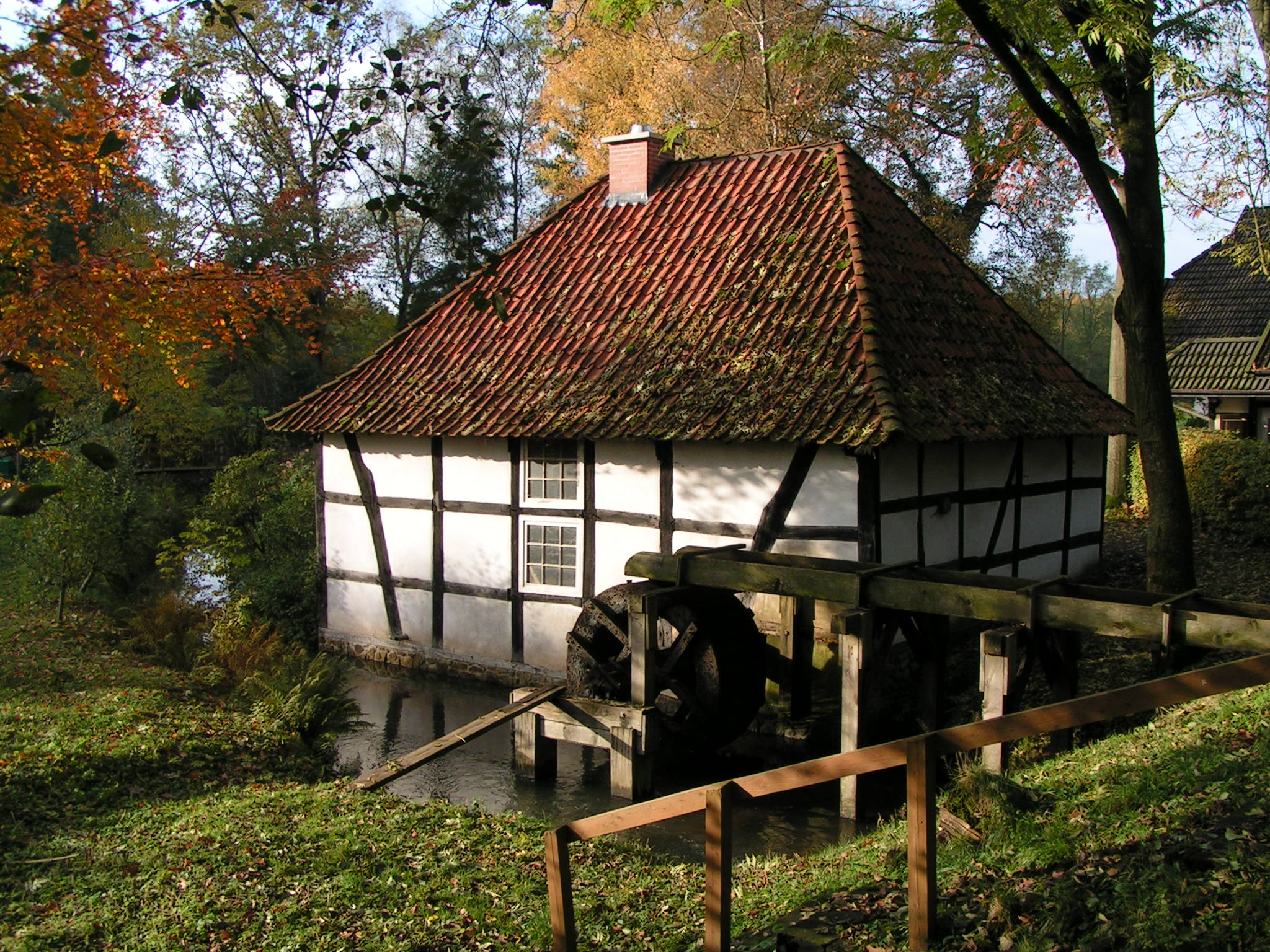 Sültemühle (oberschlächtige Wassermühle) in Lonnerbecke (Gemeinde Bippen)